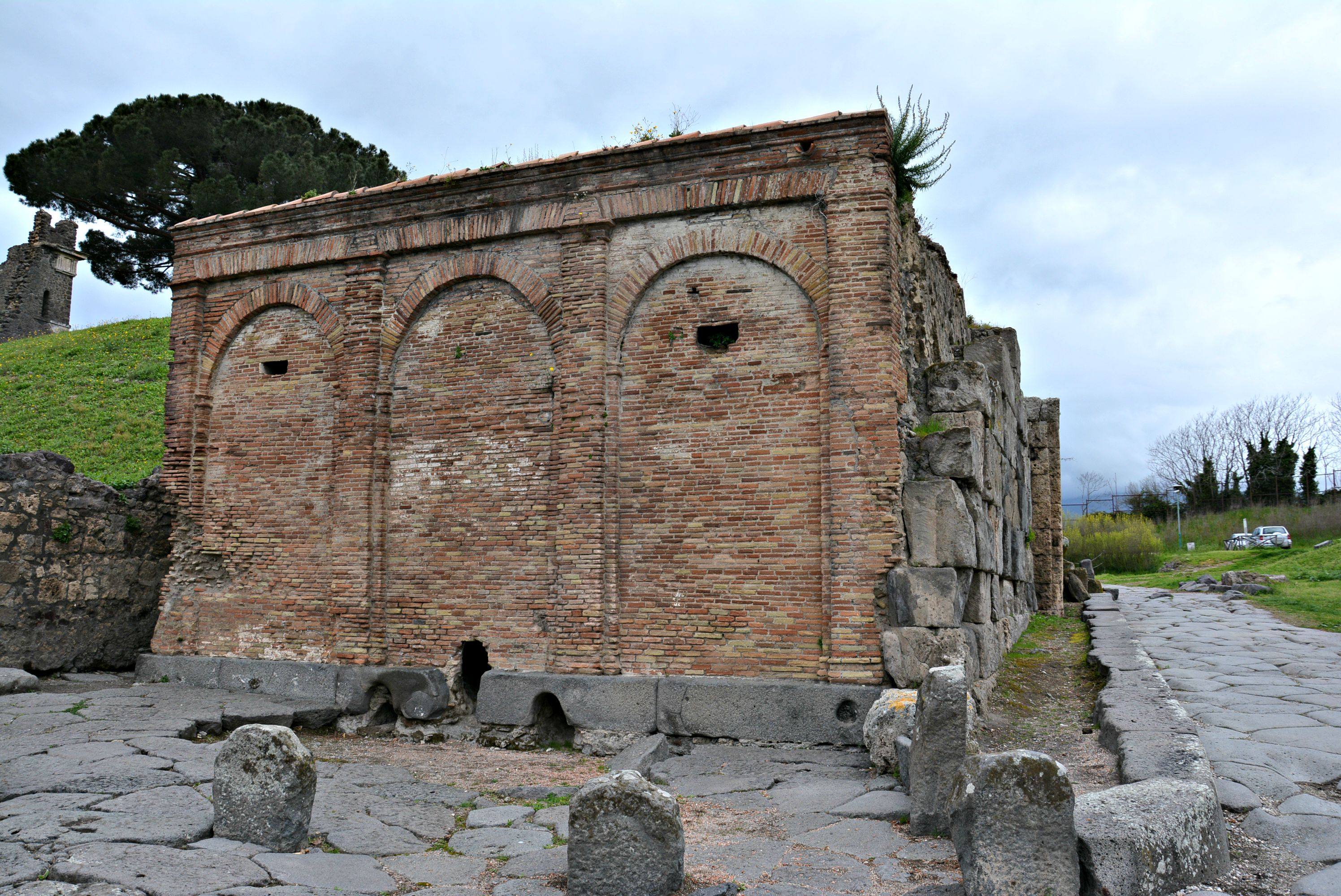 Castellum Aquae - MIBACT This is a photo of a monument which is part of cultural heritage of Italy.